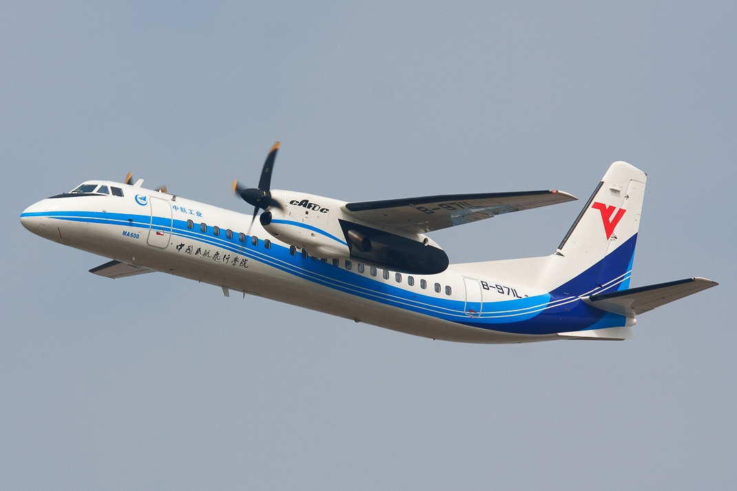 B-971L